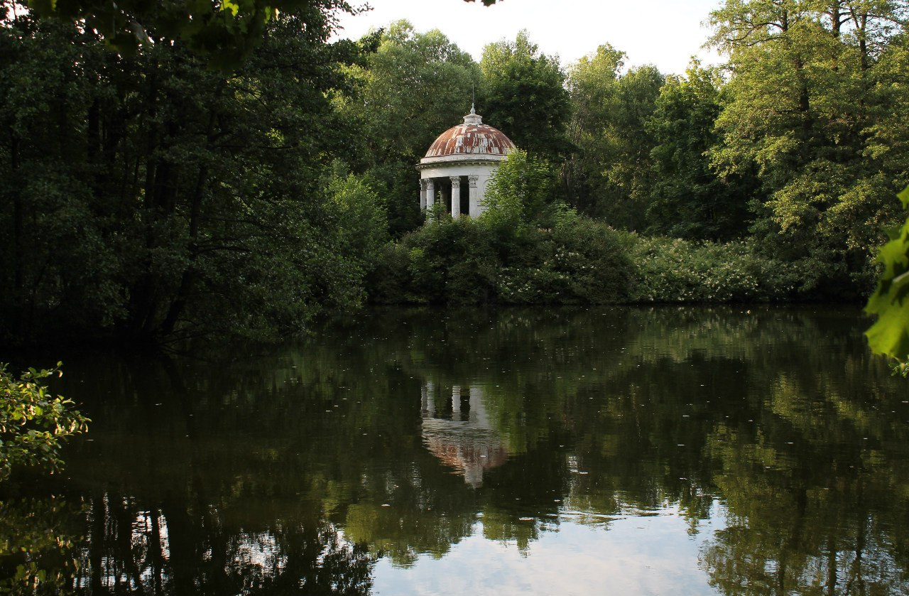 Беседка-ротонда: Быково (к югу от аэропорта), Раменский район, Московская область